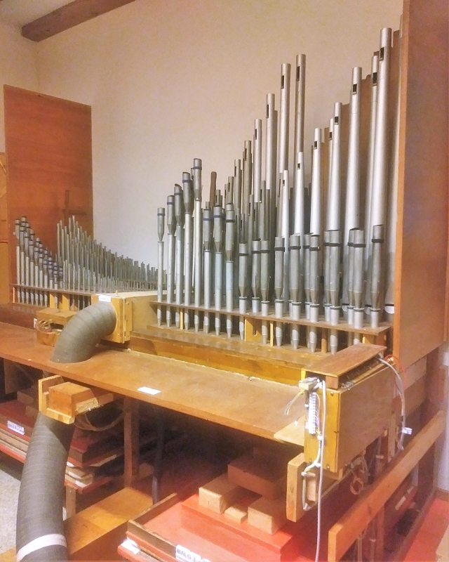 Orgelzentrum Valley